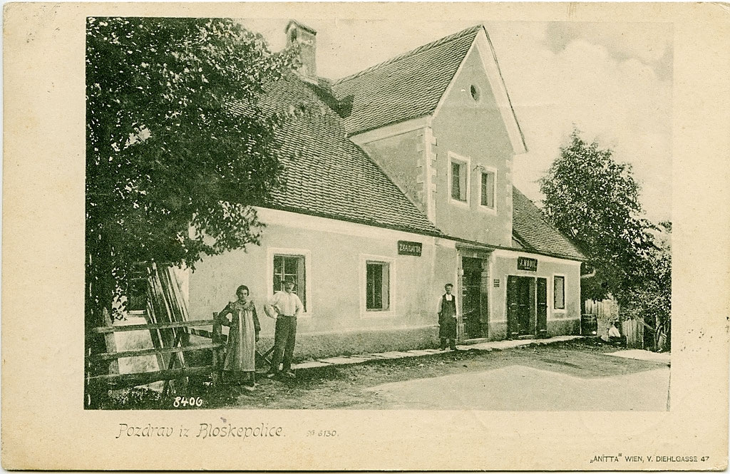 Razglednica Bloške Police.